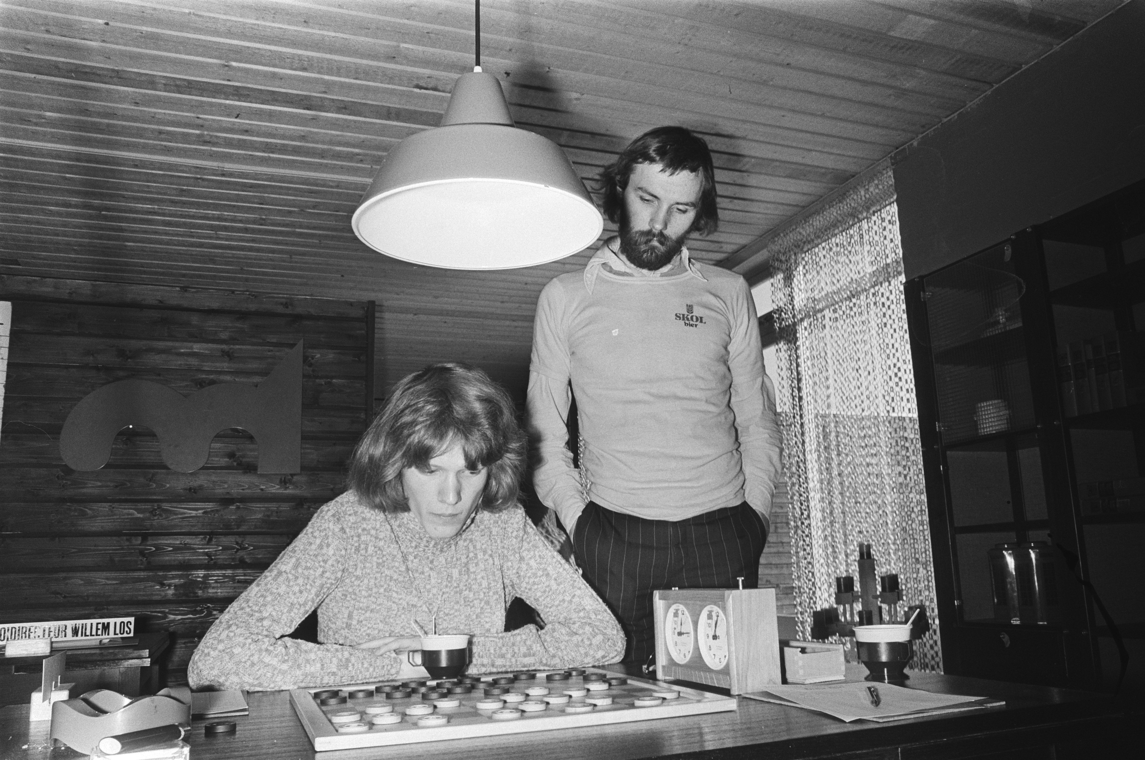 Collectie / Archief : Fotocollectie Anefo Reportage / Serie : Nederlands Kampioenschap Dammen 1977 te Zevenaar Beschrijving : Uiteindelijk kampioen Harm Wiersma als toeschouwer bij Hans Jansen Datum : 30 maart 1977 Locatie : Gelderland, Zevenaar Trefwoorden : dammen, damsport Persoonsnaam : Jansen, Hans, Wiersma, Harm Fotograaf : Bogaerts, Rob / Anefo Auteursrechthebbende : Nationaal Archief Materiaalsoort : Negatief (zwart/wit) Nummer archiefinventaris : bekijk toegang 2.24.01.05 Bestanddeelnummer : 929-0996